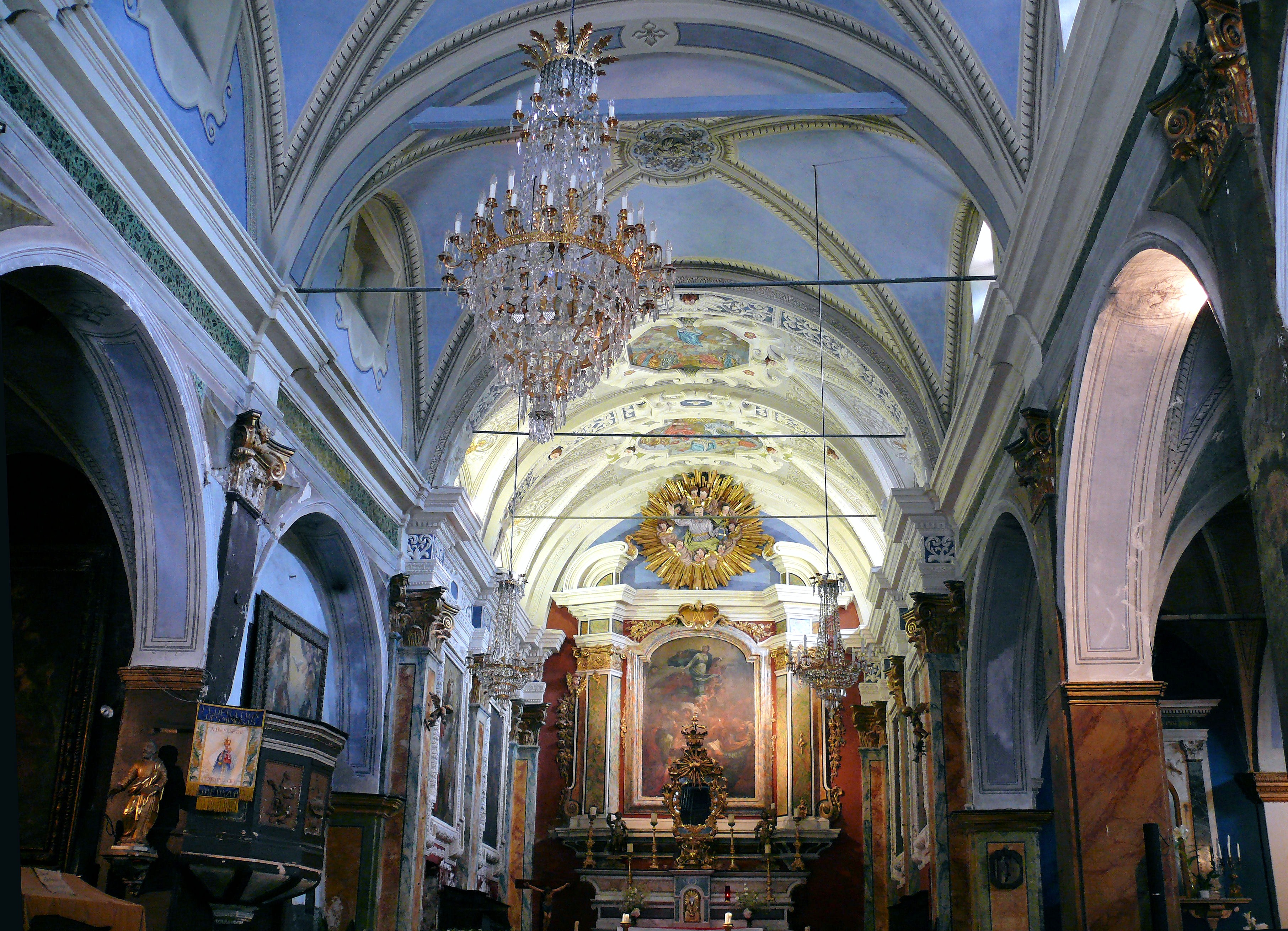 Saint-Martin-Vésubie - Eglise Notre-Dame-de-l'Assomption - Nef